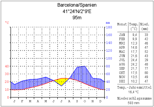 Klimadiagramm Barcelona